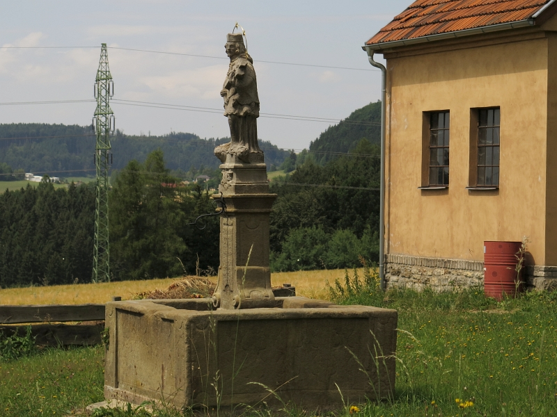 Socha svatého Jana Nepomuckého, Říčky (Orlické Podhůří).